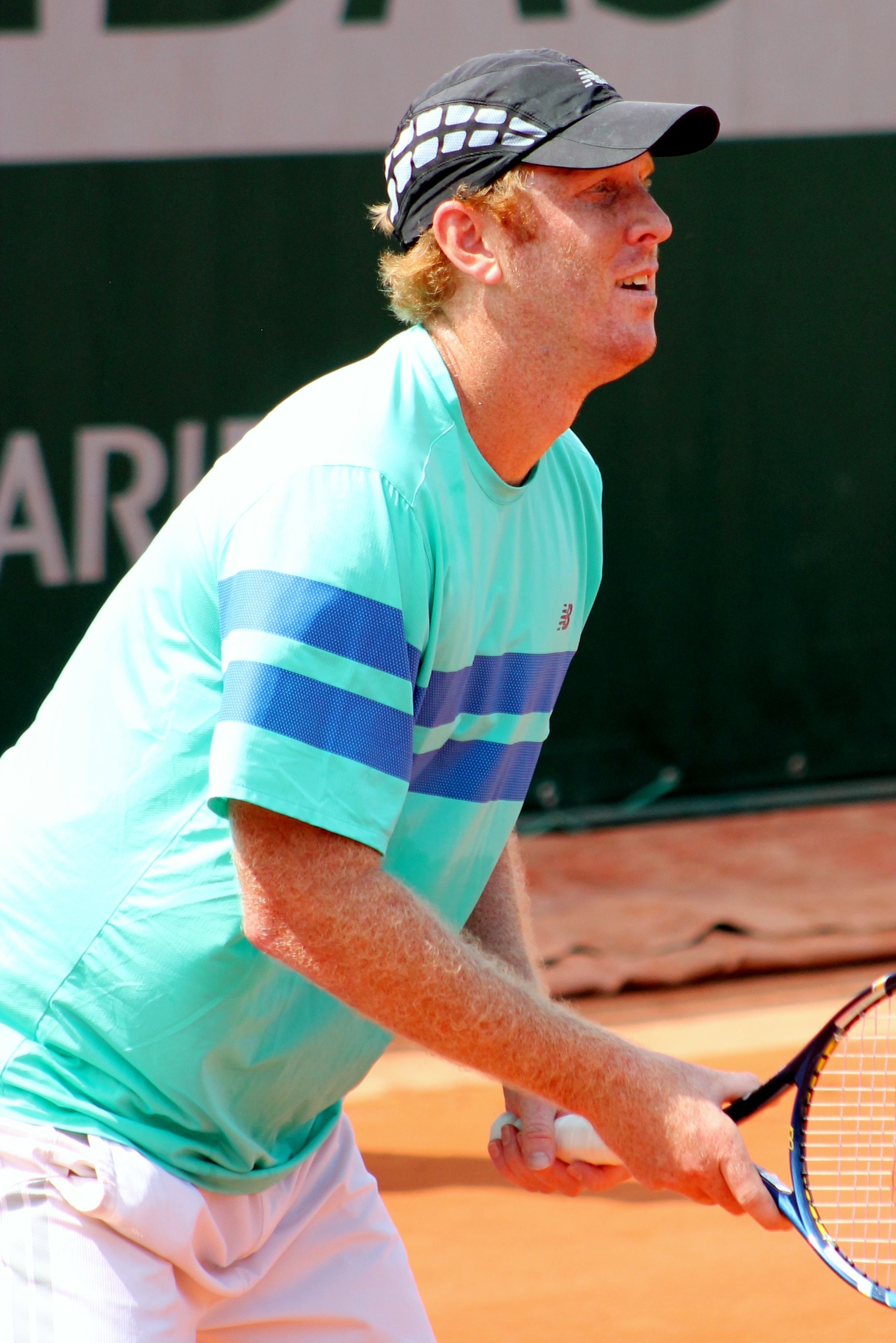 Guccione RG16 (9)